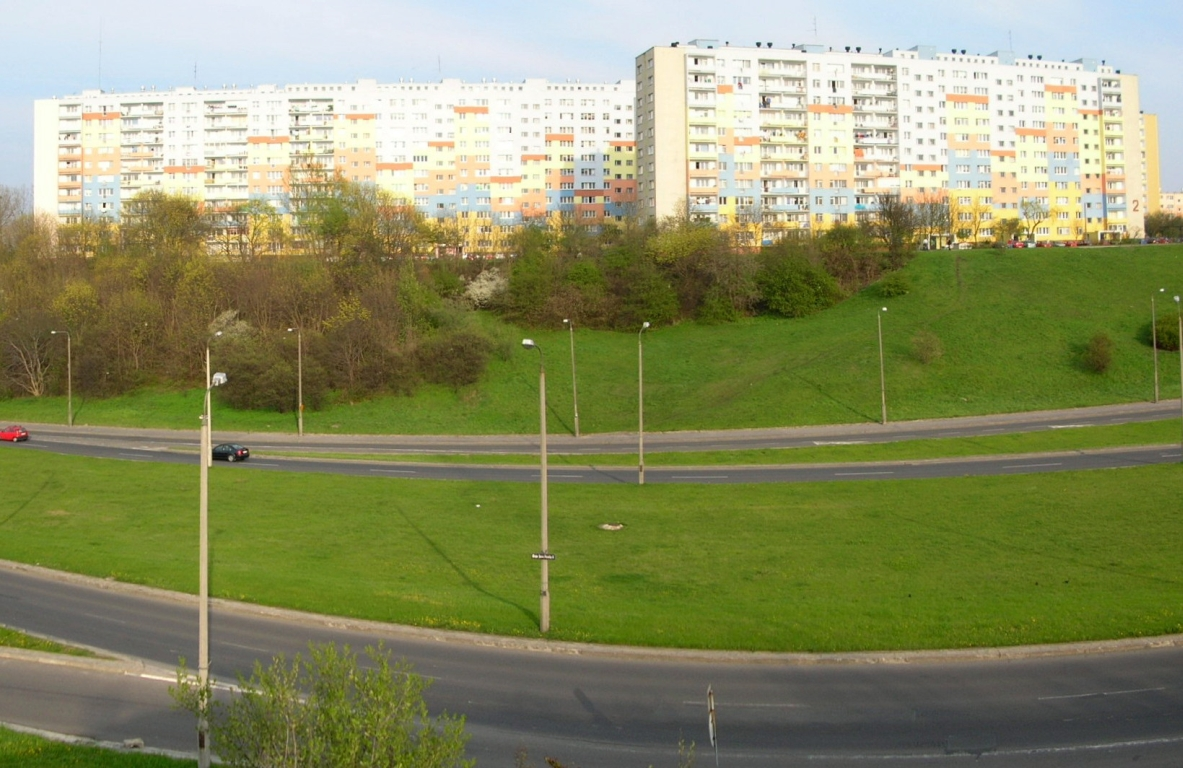 Aleja Jana Pawła II w Bydgoszczy - widok na osiedle Wyżyny